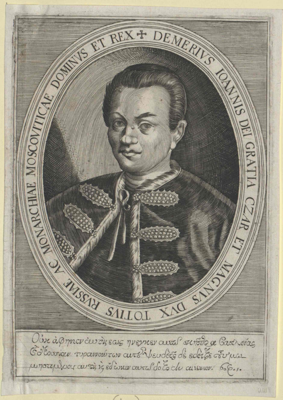 Dymitr Samozwaniec I(1581-1606)